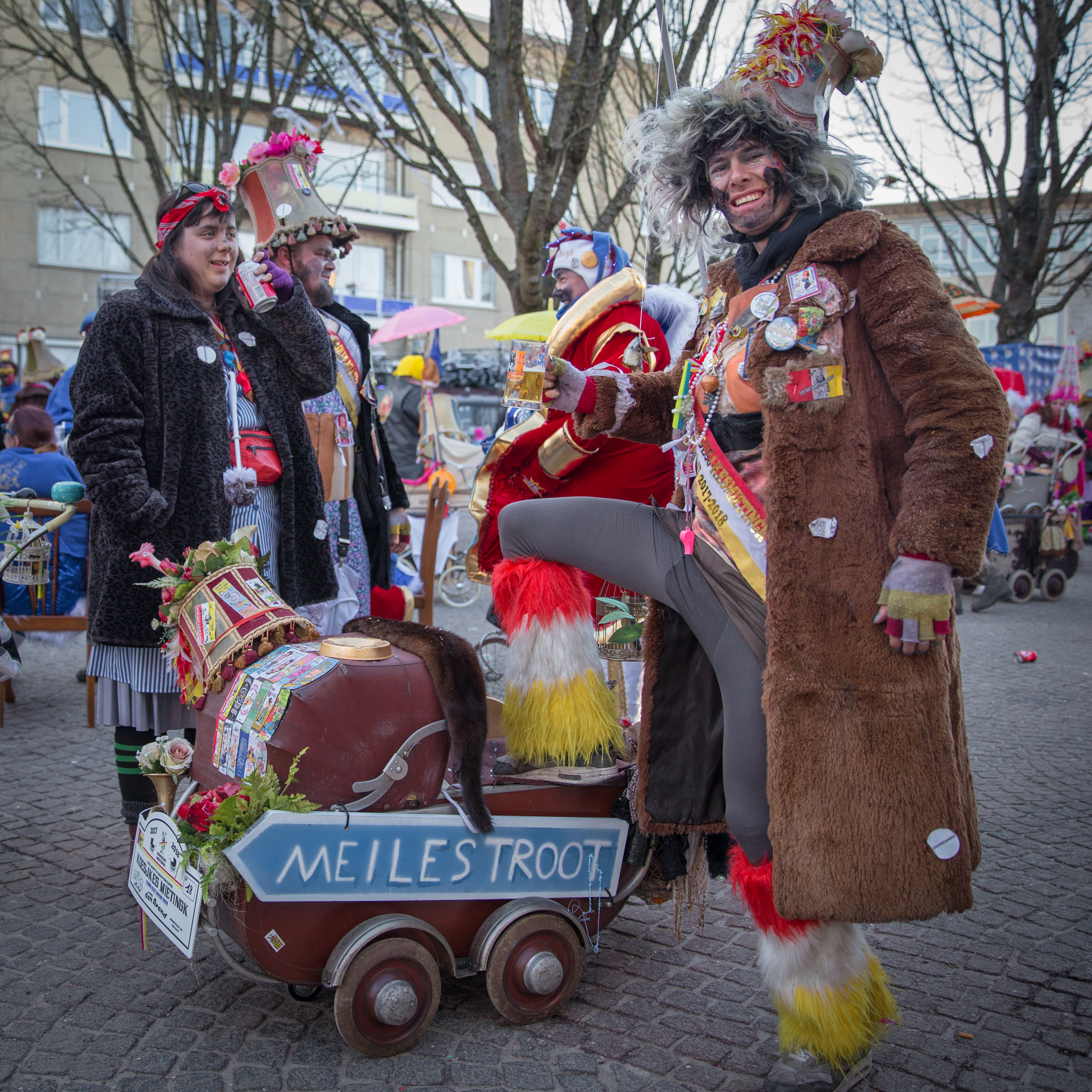 Vuil janet tijdens Carnaval Aalst 2018, op het Vredeplein.